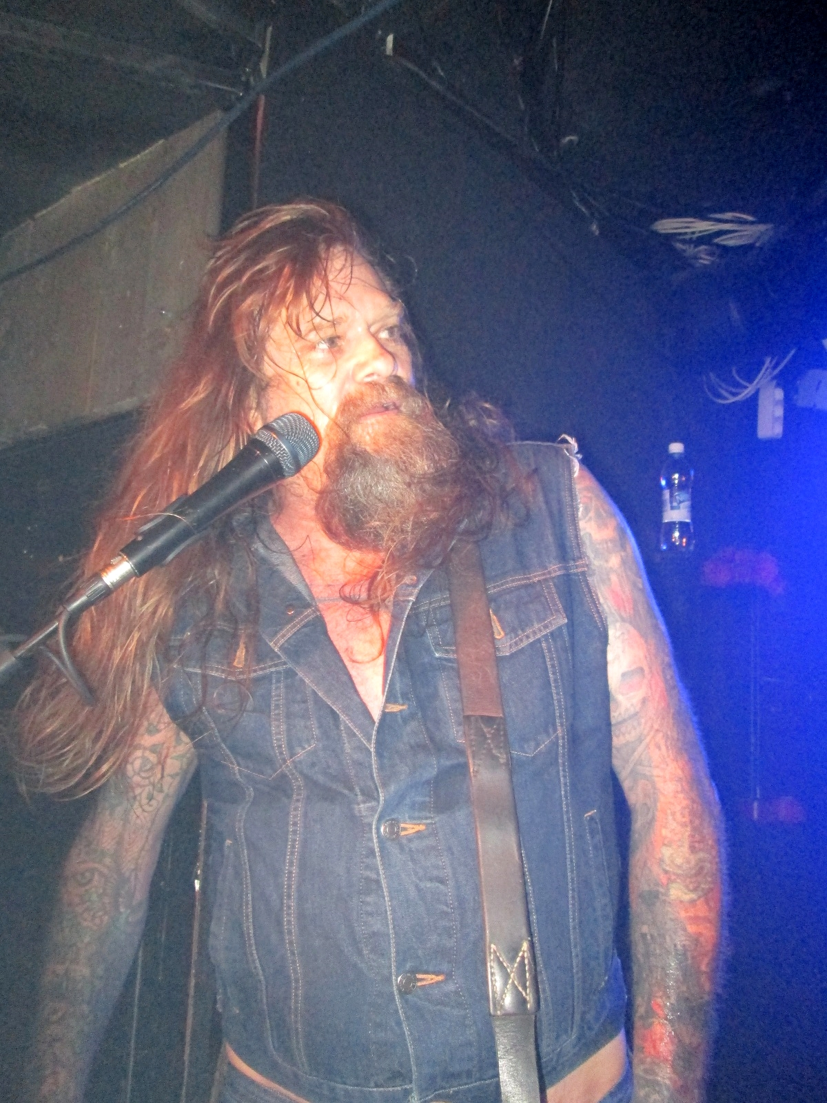 Chris Holmes, Tampere 3.4.2014